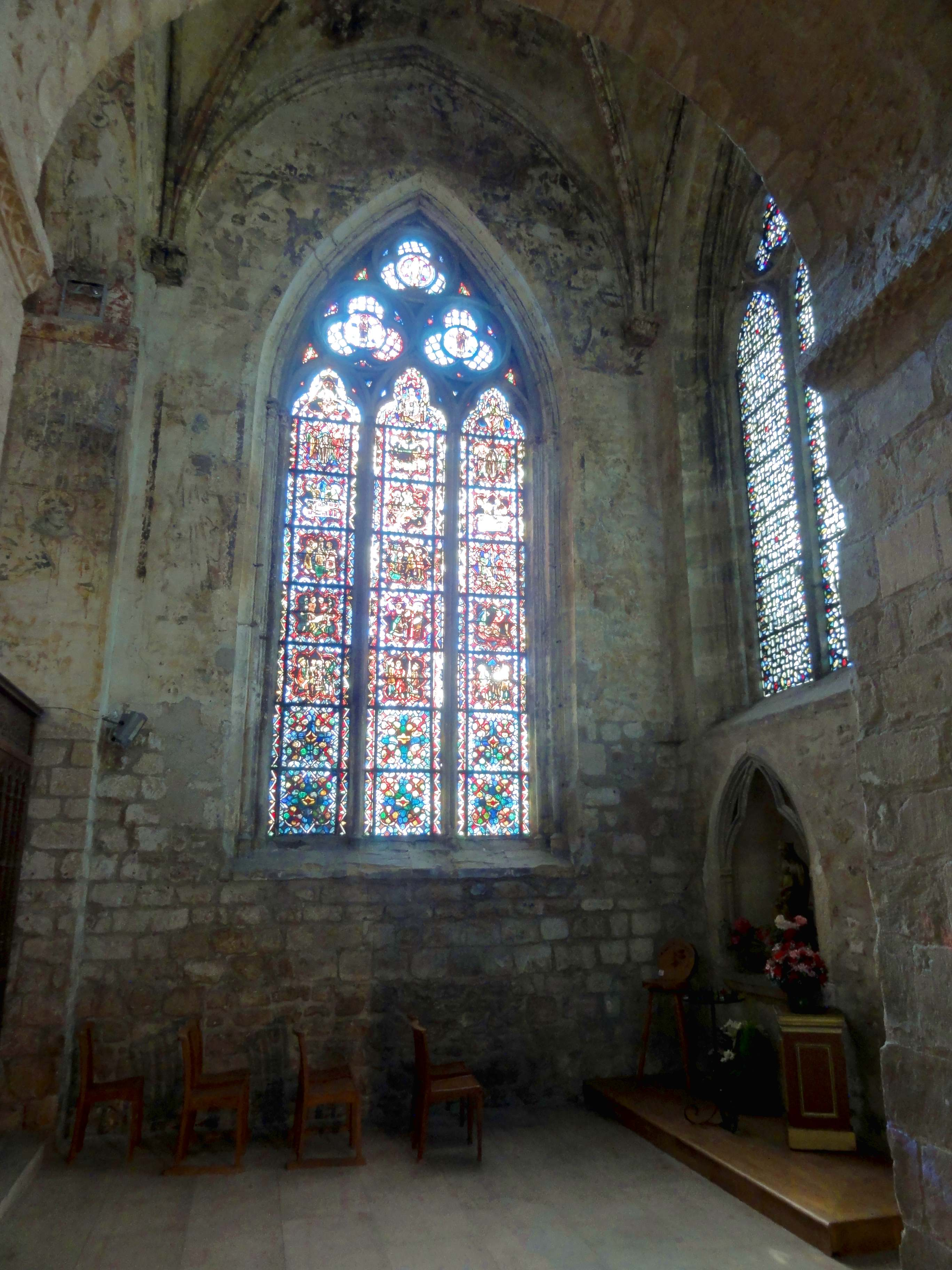 Intérieur de l'église - voir titre.